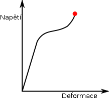 Diagram závislosti deformace na napětí v tlaku